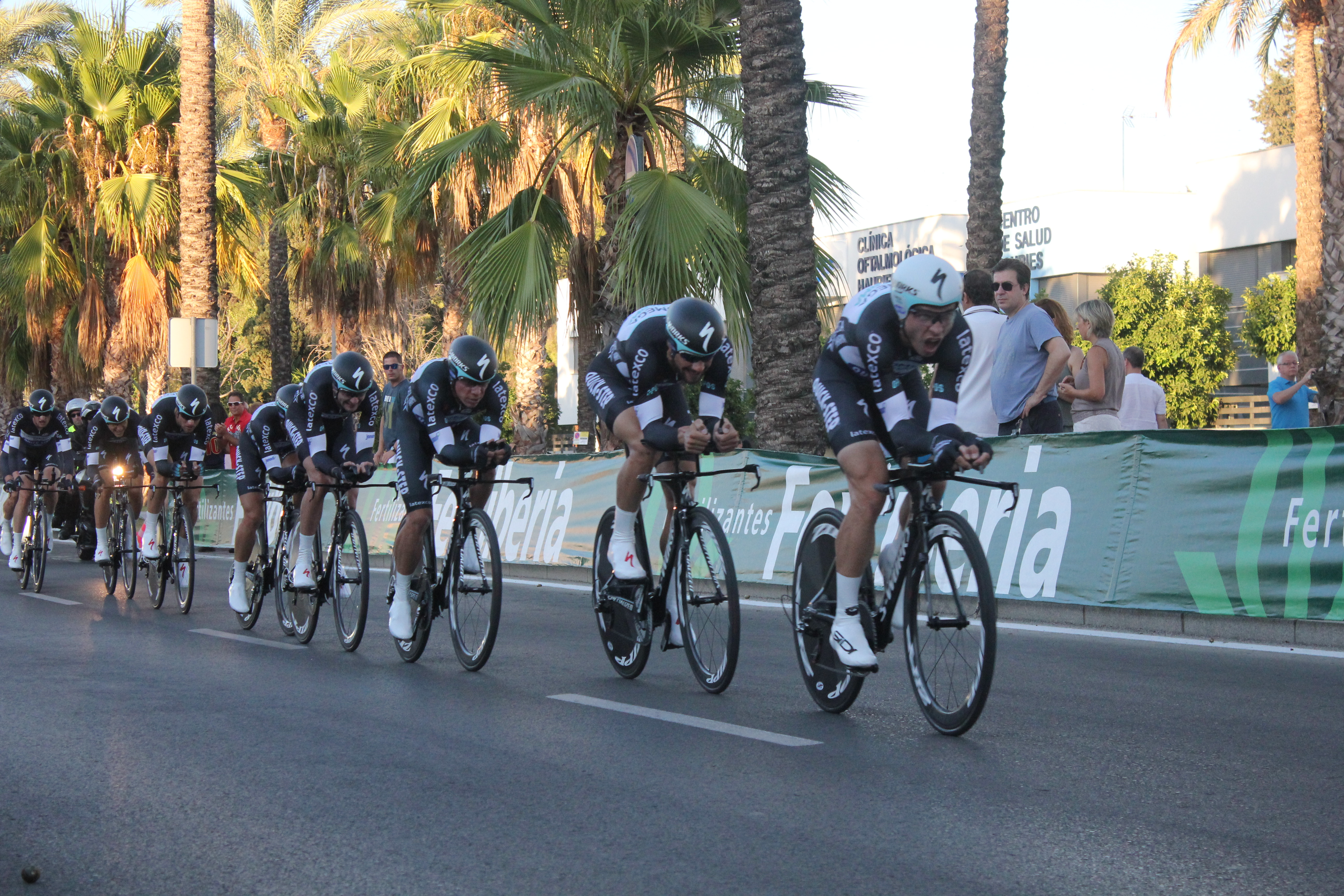 Equipo Omega Pharma-Quick Step. Primera etapa de la Vuelta Ciclista a España 2014, Jerez de la Frontera (Andalucía, España)